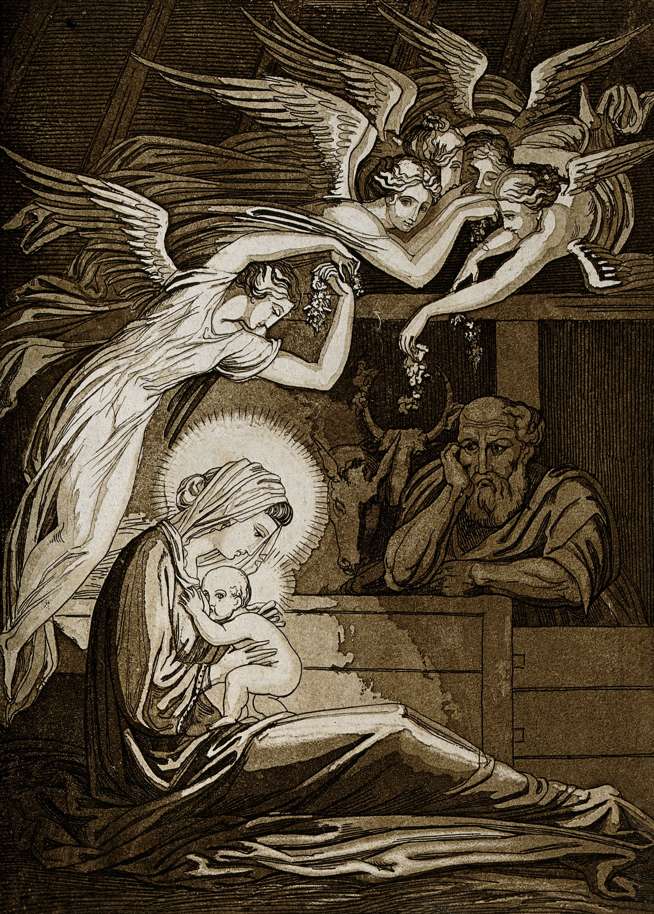 L'Enfant-Jésus tétant Sa Mère, sous le regard de saint Joseph et d'anges aux traits féminins.